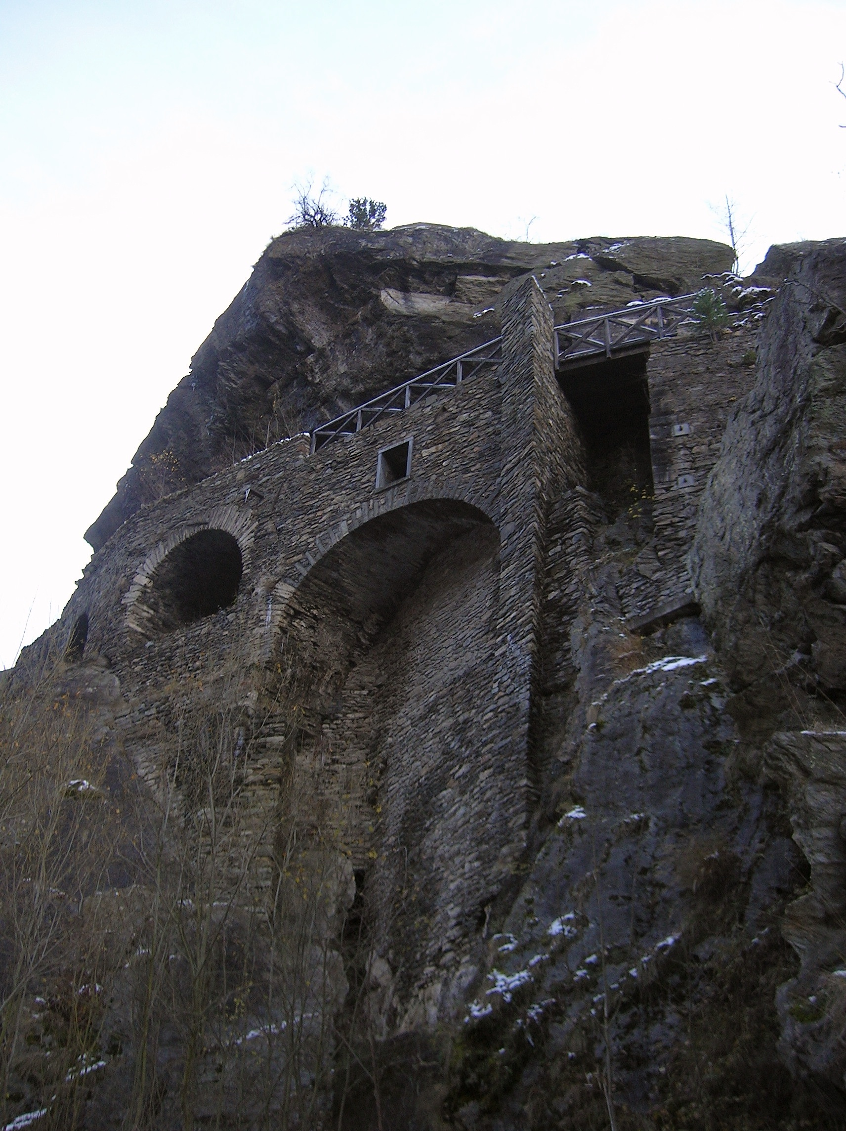 Pierre Taillée, tratto di via delle Gallie inciso nella roccia dai romani, nella gola detta di Pierre Taillée, sopra la galleria sulla SS26. Avise, Valle d'Aosta, Italia